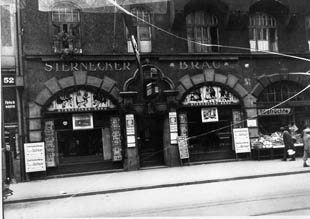 Das Sternecker Bräu im Tal 54